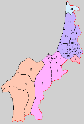 青森県西津軽郡の町村。